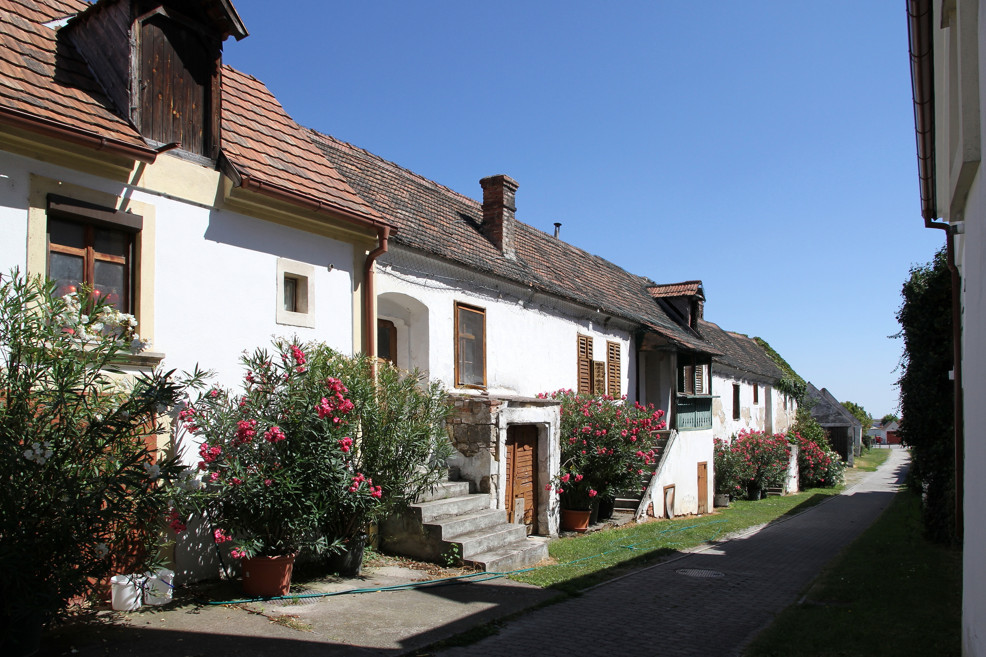 Wohnhaus, Hauptstraße 63b, in der burgenländischen Gemeinde Mörbisch am See.